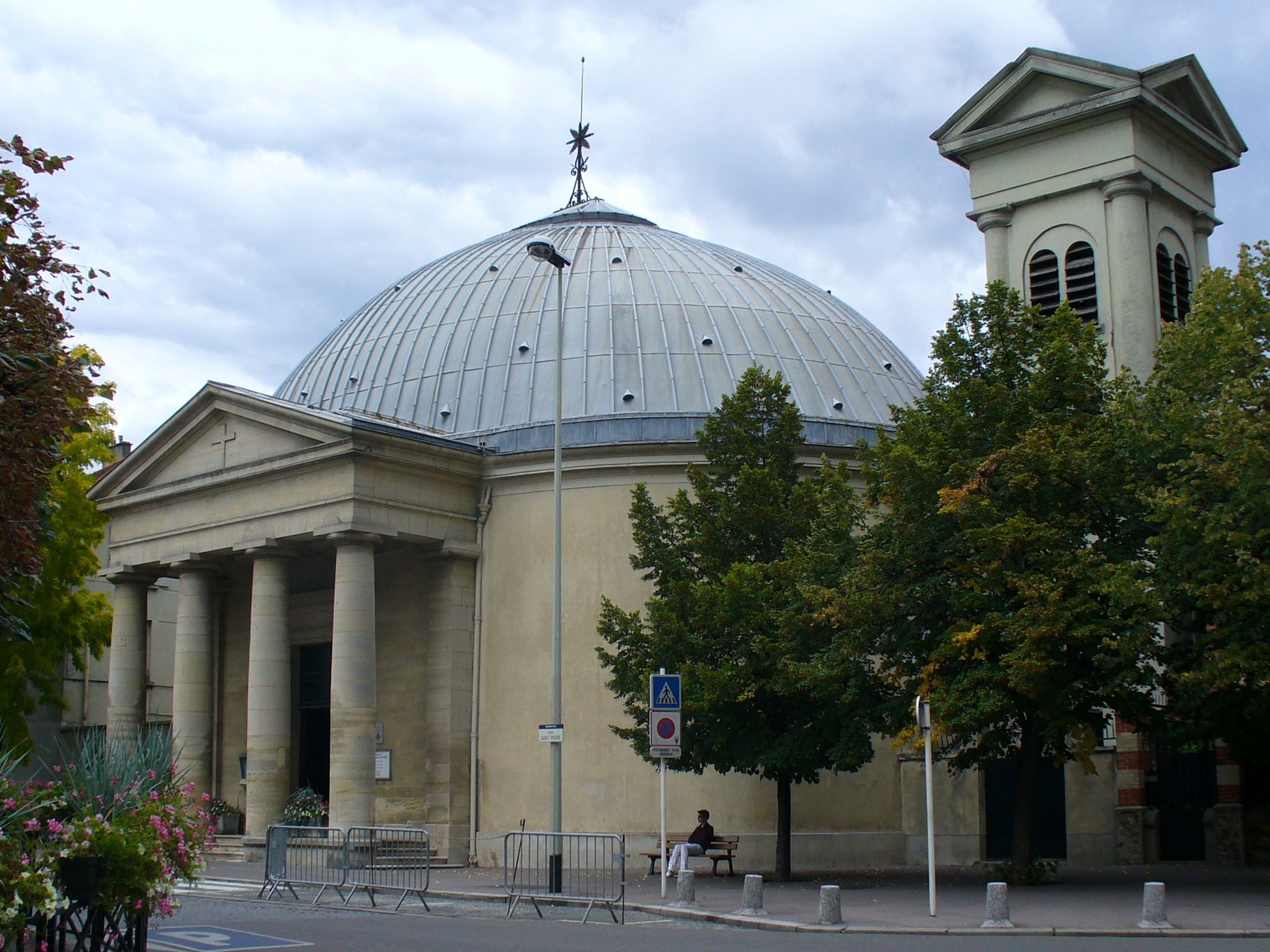 Église de Courbevoie (Hauts-de-Seine)